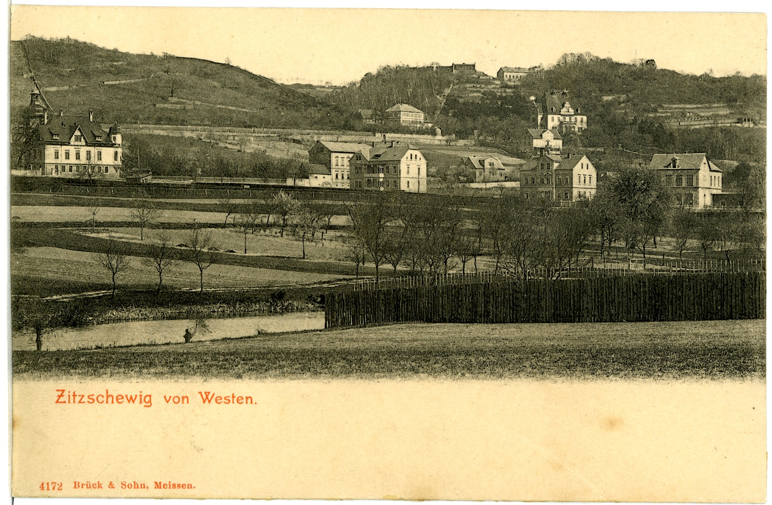 Zitzschewig; Ortsansicht von Westen This postcard is from publisher Brück & Sohn in Meißen ( postcard has a unique number 04172 and is available in a higher resolution at the publisher. This images was uploaded in a cooperation project between Wikipedians and the publisher.